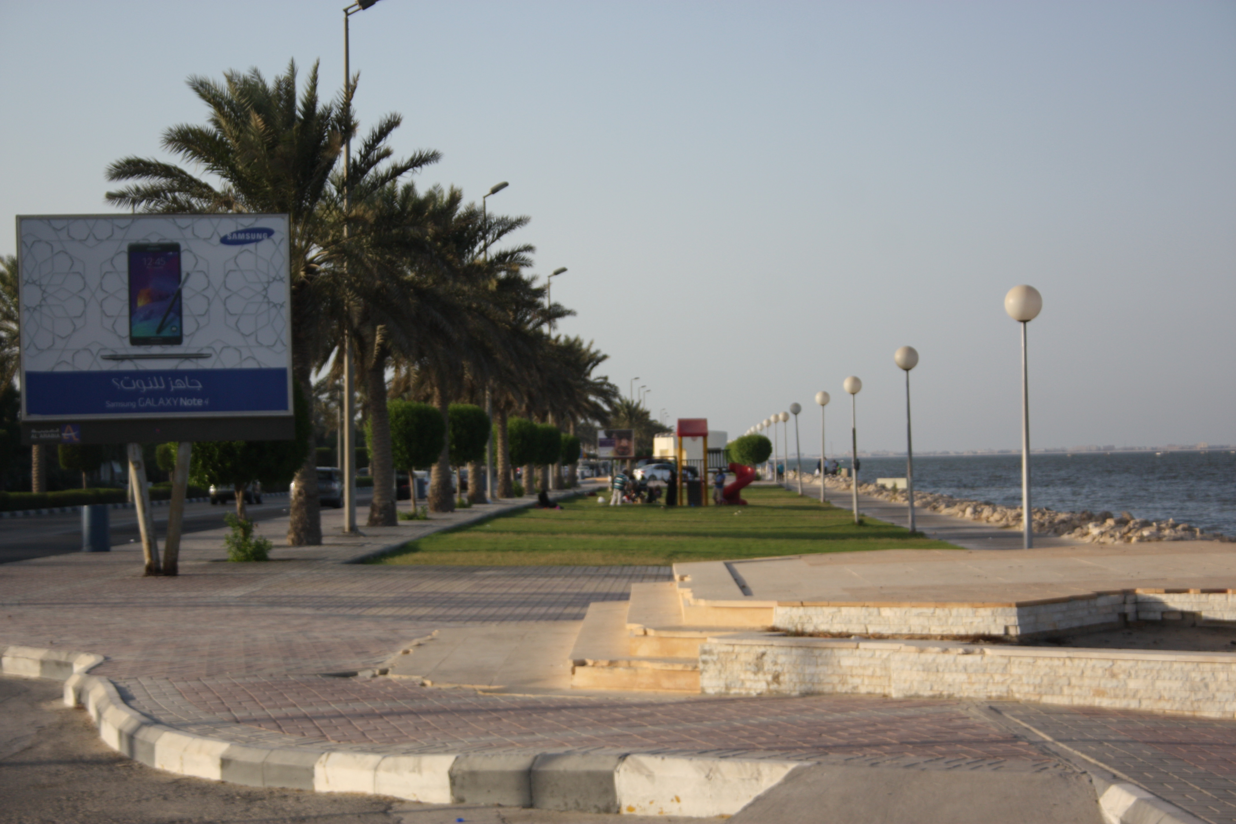 سيهات